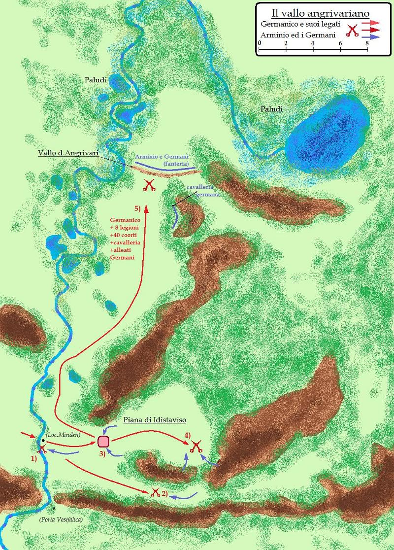 La battaglia di del vallo degli Angrivari del 16 d.C. (giustificativo mancare)